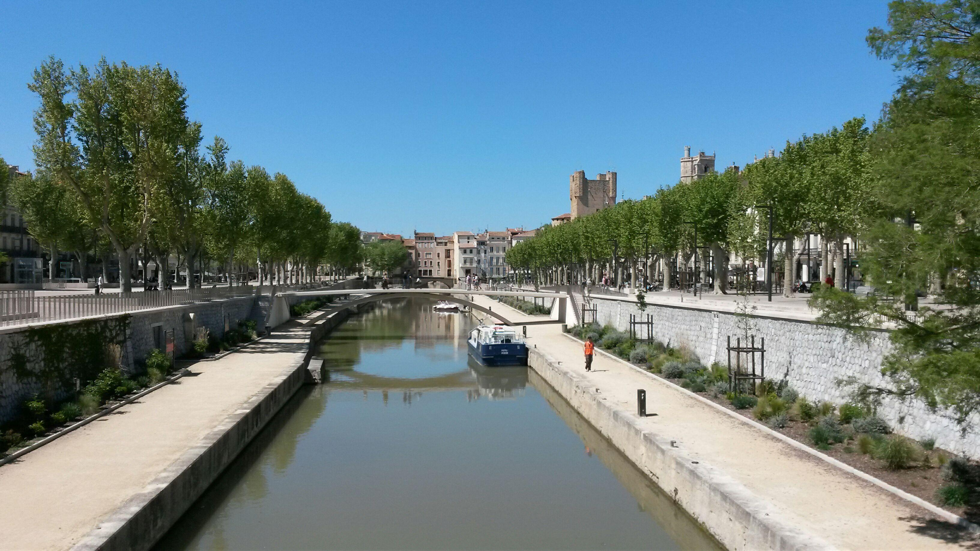 Canal de la Robine, Narbonne, France